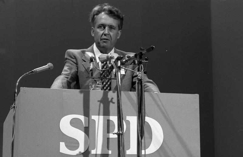 Außerordentlicher Parteitag der SPD in der Westfalenhalle Dortmund